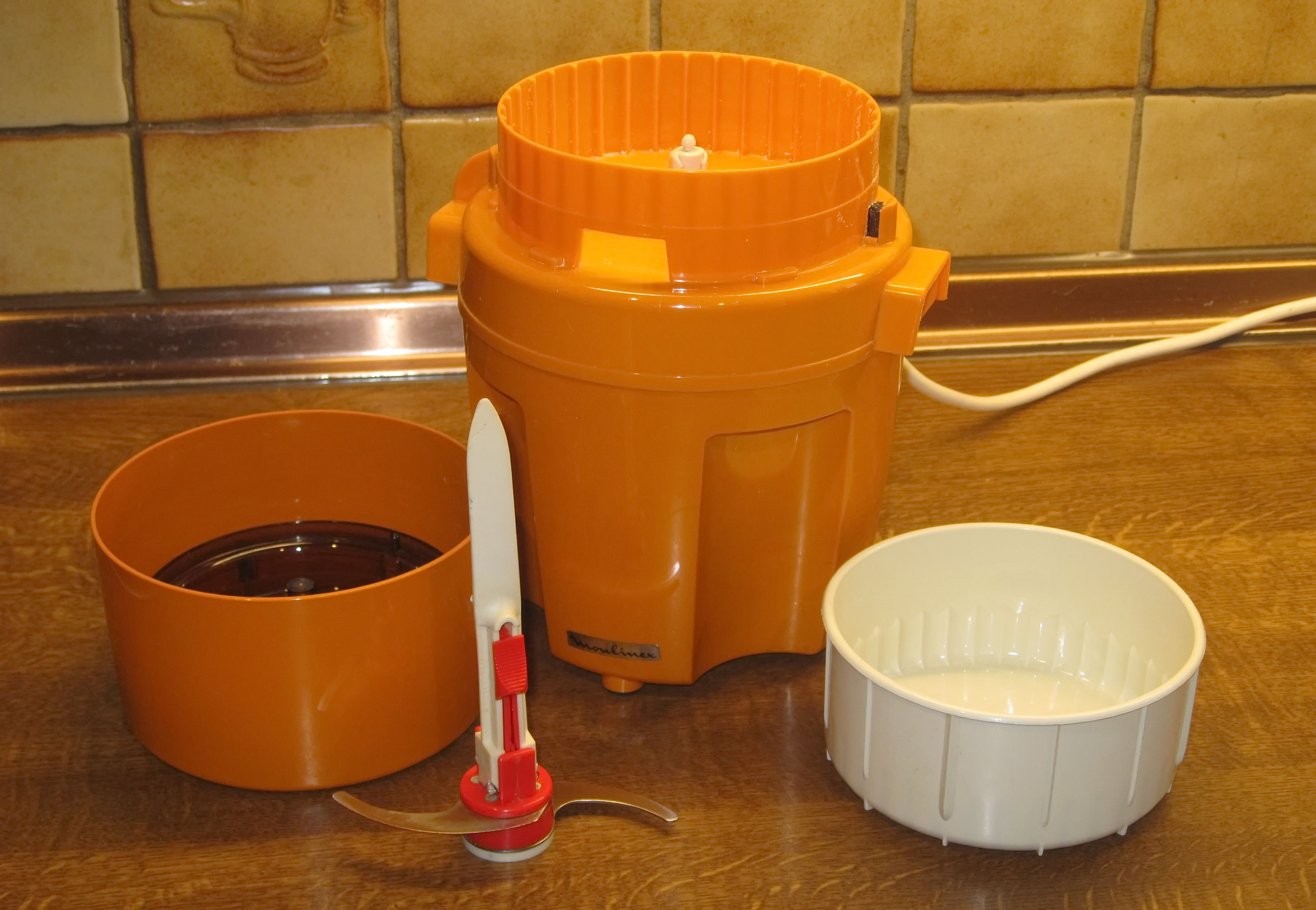 Moulinex Moulinette, Zerkleinerer Type 32002.